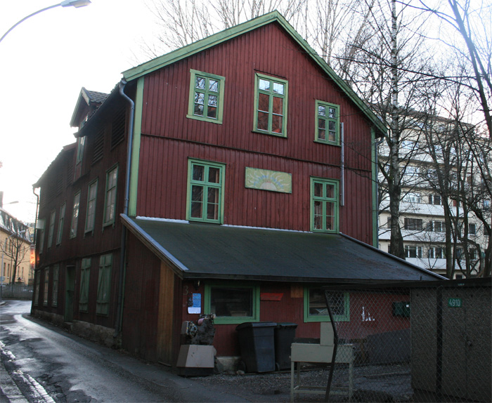 Hjelms gate 3 in Oslo